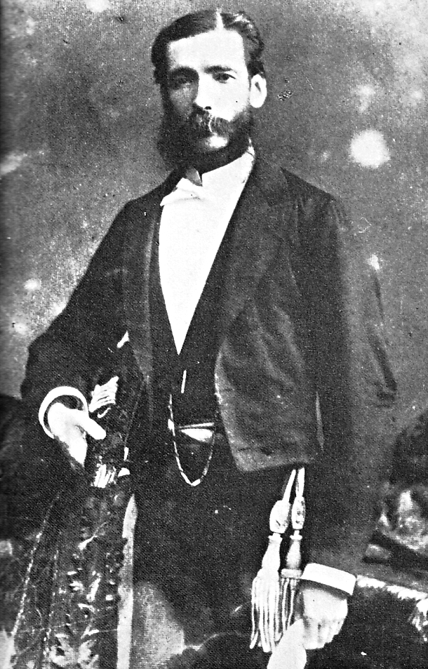 Alberto Elmore (1844-1916), diplomático, político y abogado peruano. Presidente del Consejo de Ministros (1891 y 1904) y Ministro de Relaciones Exteriores (1887-1888, 1890-1891 y 1904).